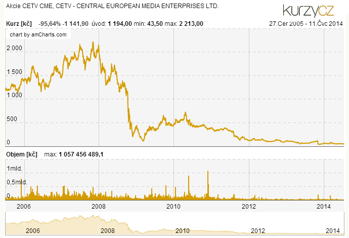 Akcie CME - Graf vývoje kurzu na Burze Praha.